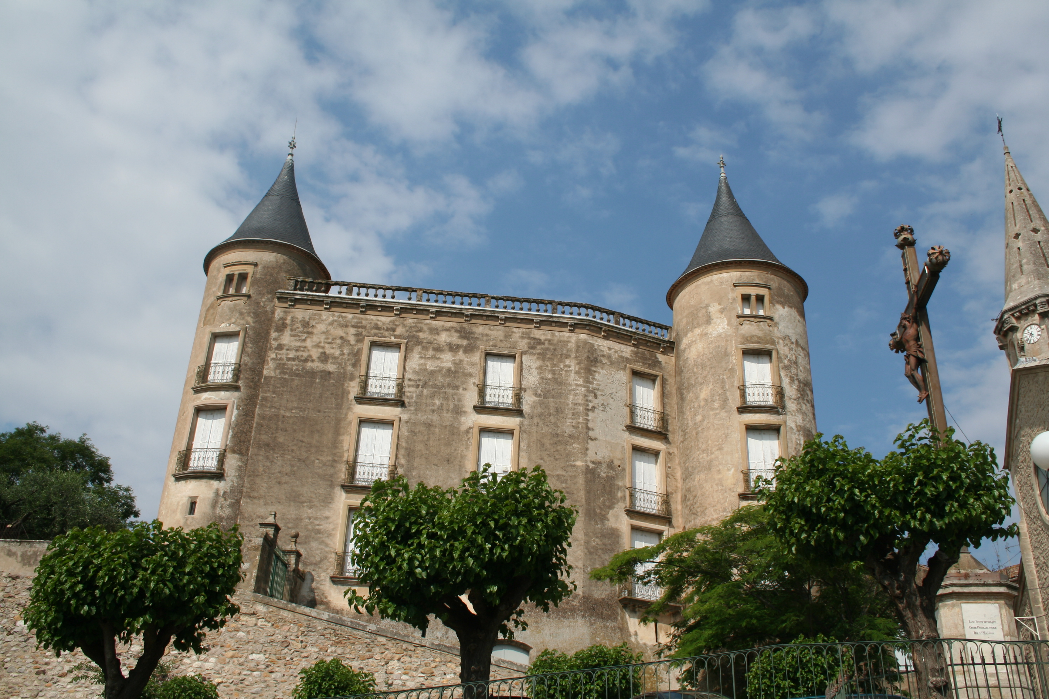 Pouzolles (Hérault) - château.